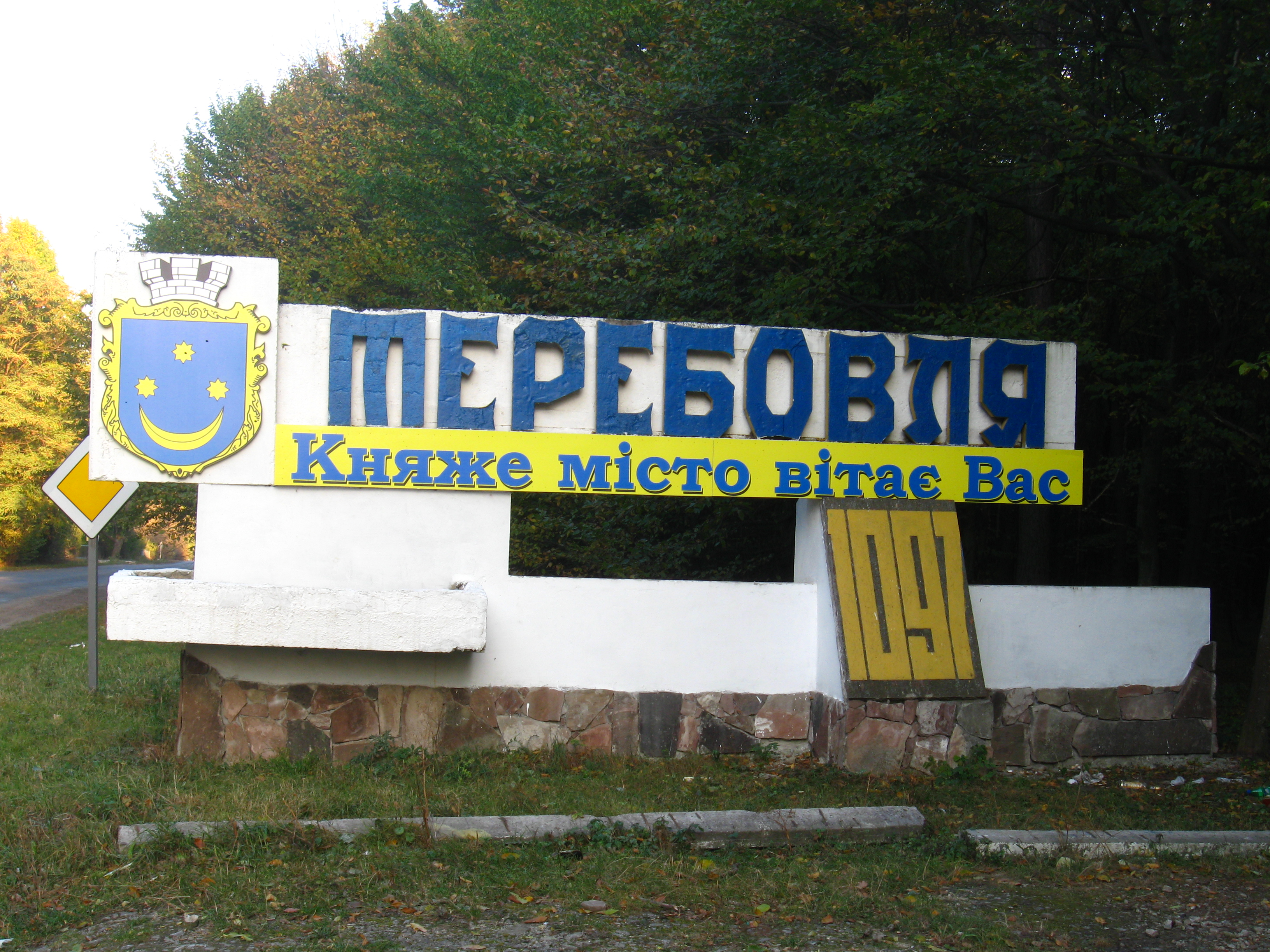 Знак при в"їзді у місто по дорозі з Застіноче.